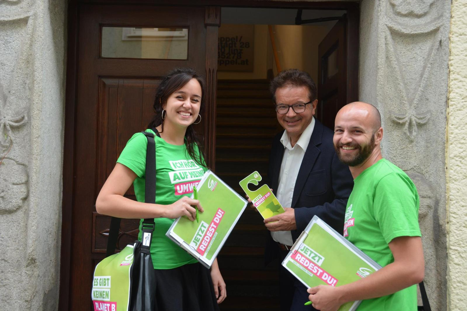 Sophia Hochedlinger, Rudi Anschober, Severin Mayr #jetztredestdu #linz